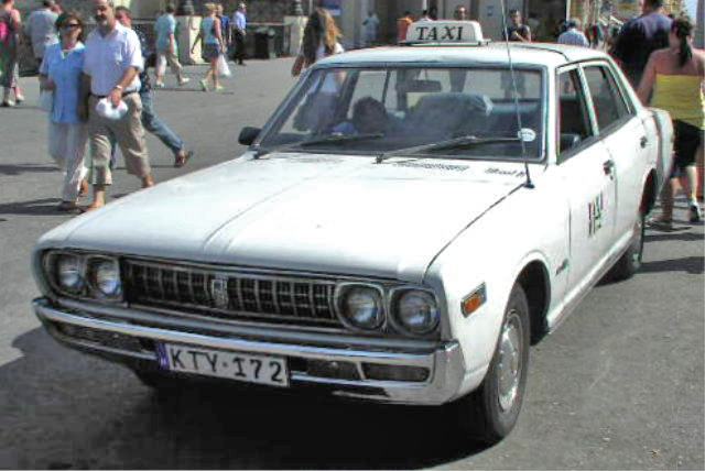 Datsun 220 C Malta Taxi